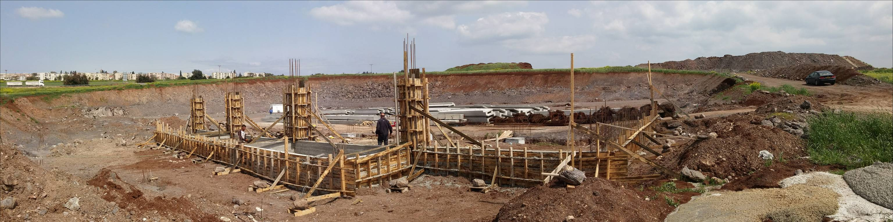 Bodek Architects Tiberias Football Stadium